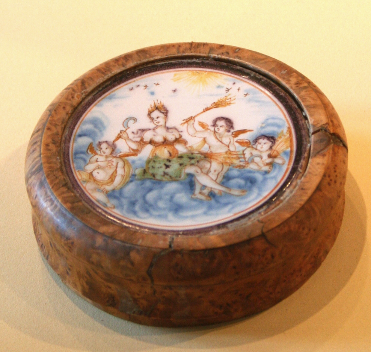 Musée de la faïence à Marseille, fabrique Fouque-Pelloquin à Moustiers, boîte à mouches ou tabatière, représentation de Cérés.